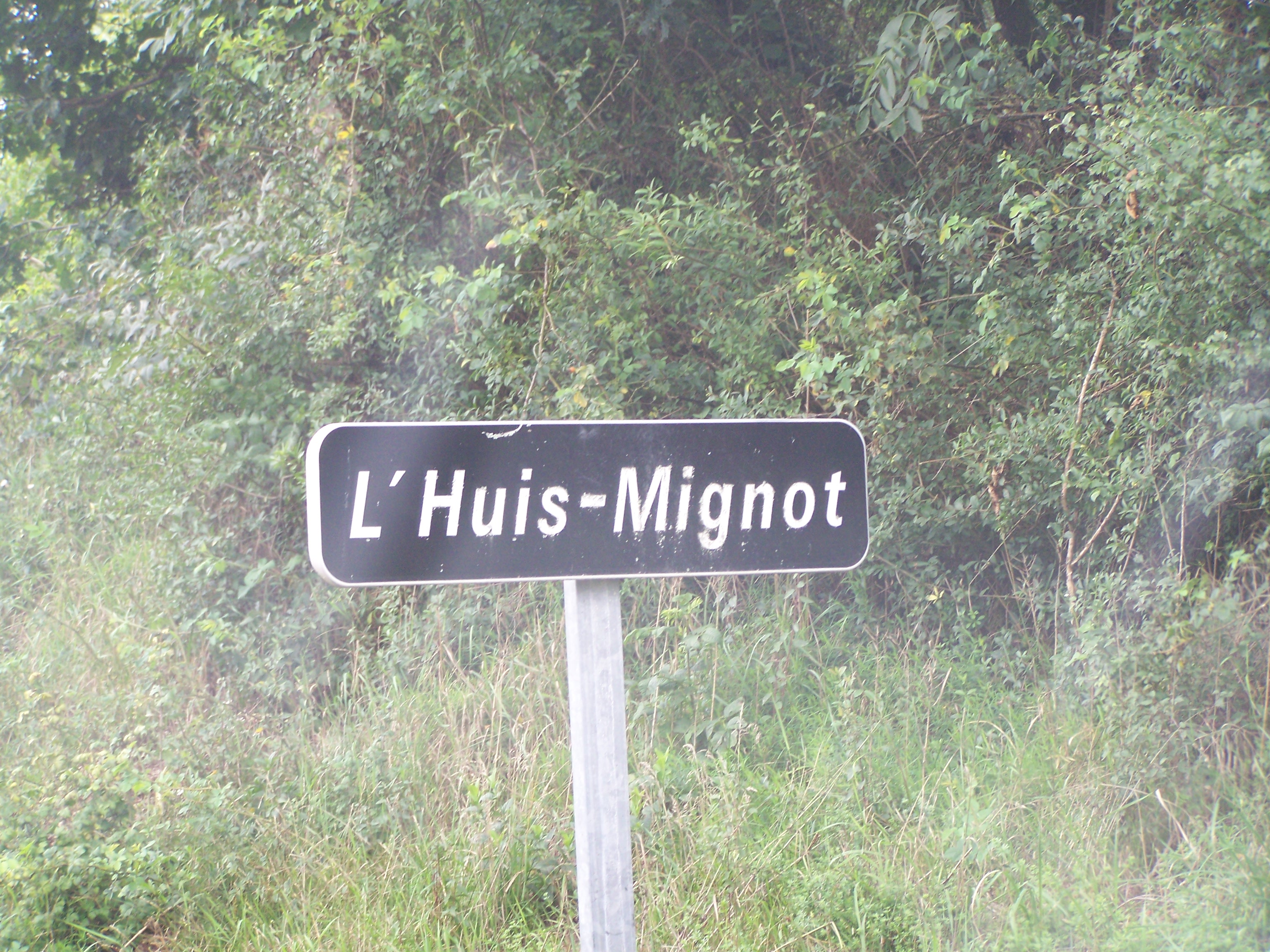 Panneau du lieu-dit l'Huis-Mignot, sur la commune de Montigny-en-Morvan (Nièvre, France)